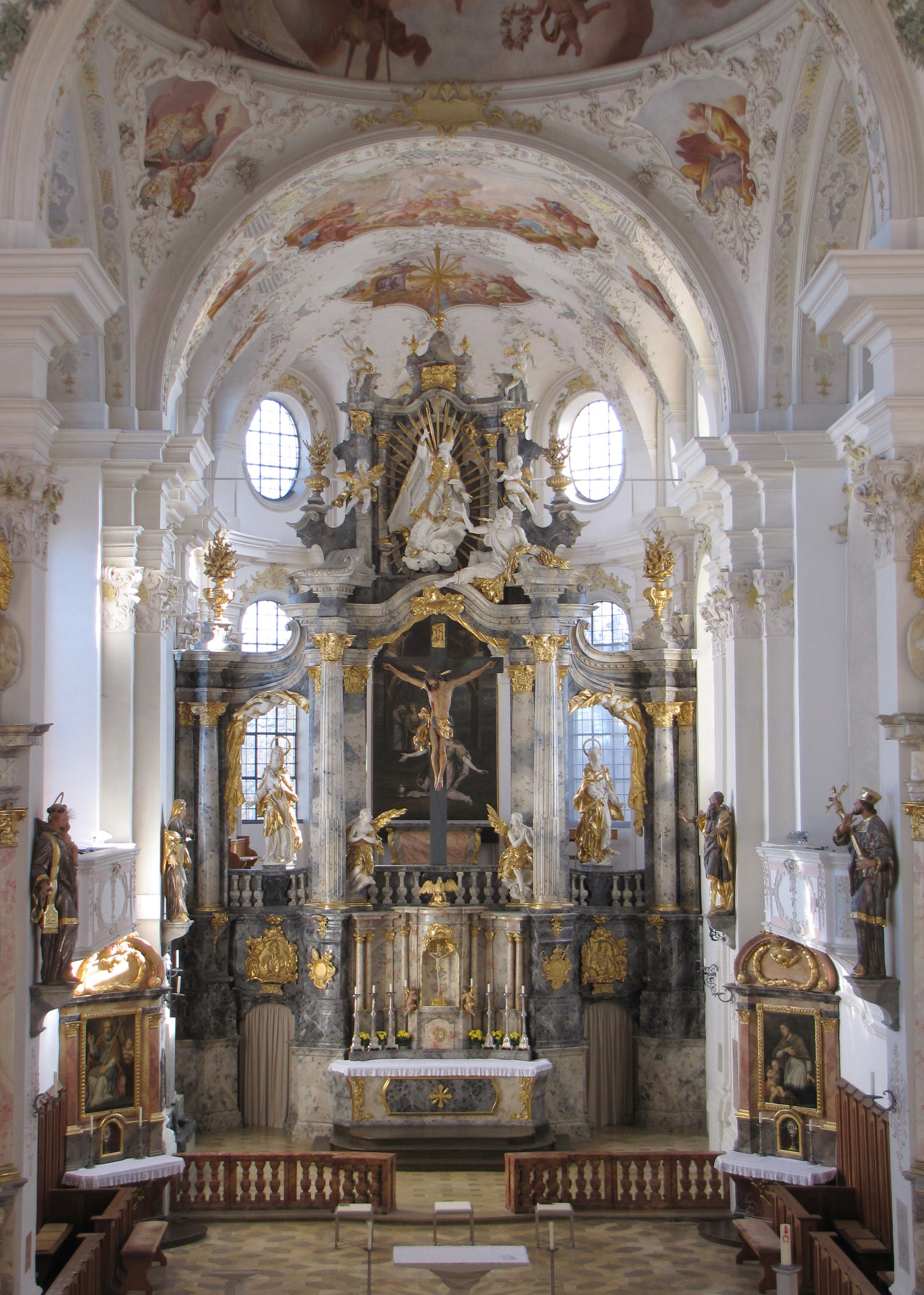 Chorraum und Hochaltar in der Pfarrkirche St. Martin, Marktoberdorf (Ostallgäu)